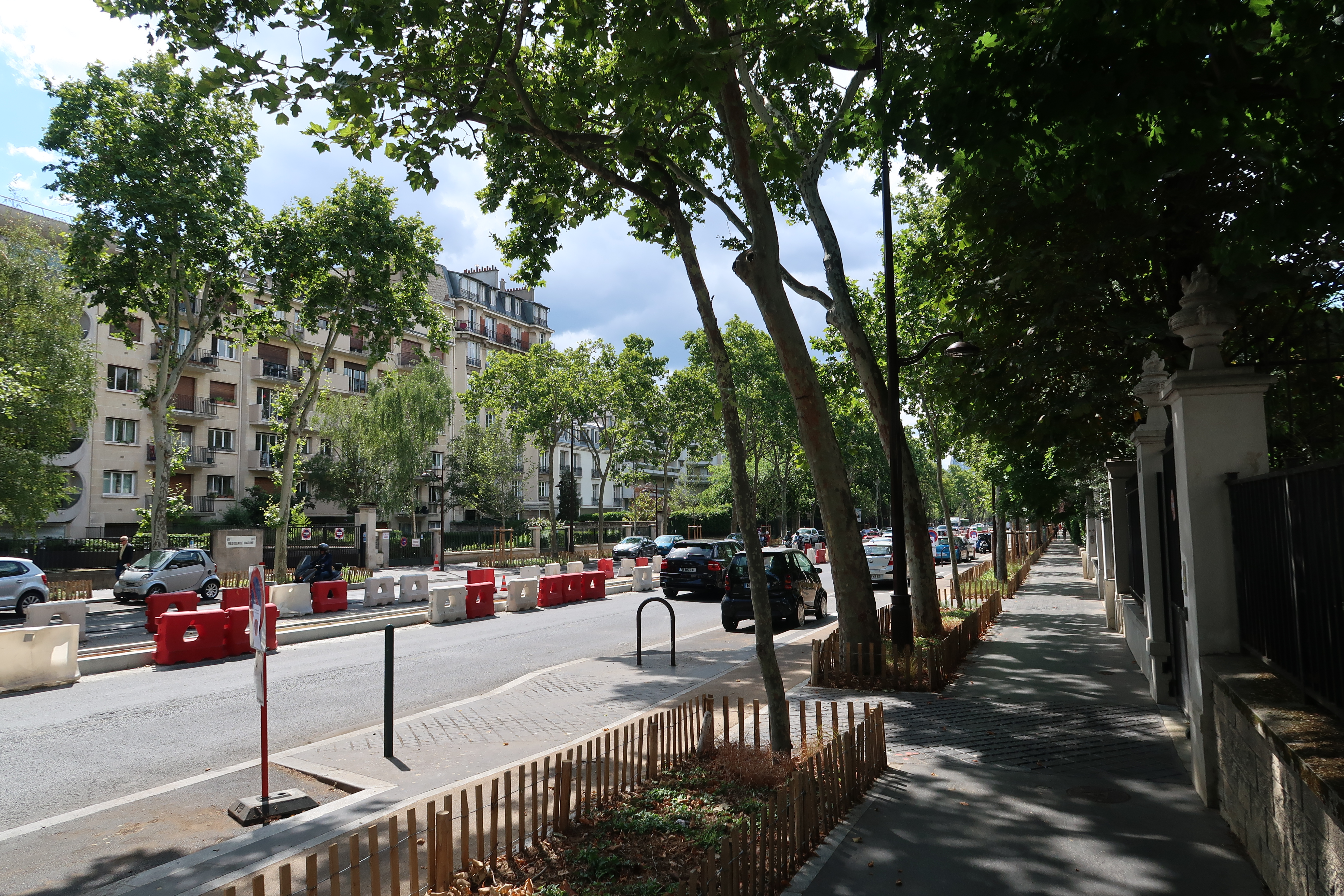 Boulevard Bineau à Neuilly-sur-Seine (Hauts-de-Seine).